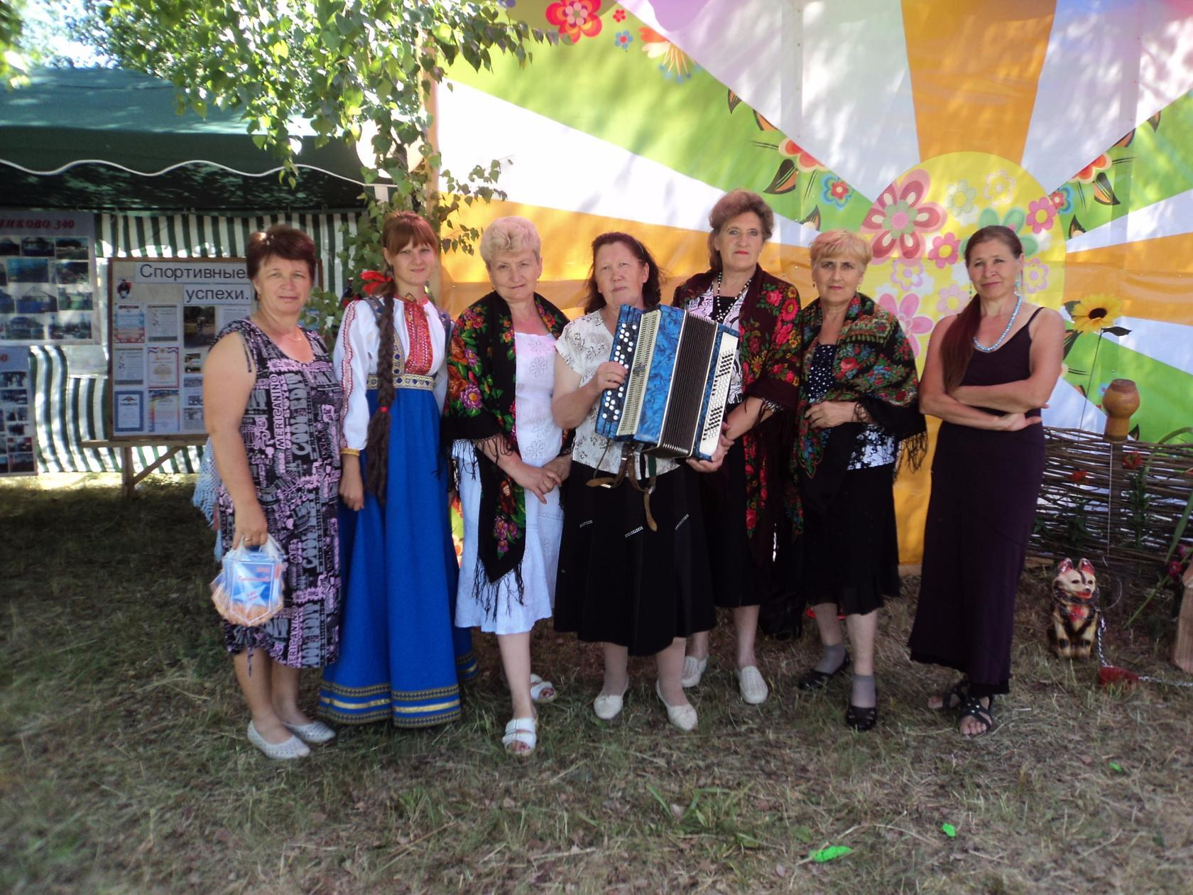 Творческий коллектив с. Крестниково, Цильнинский район, Ульяновская область.